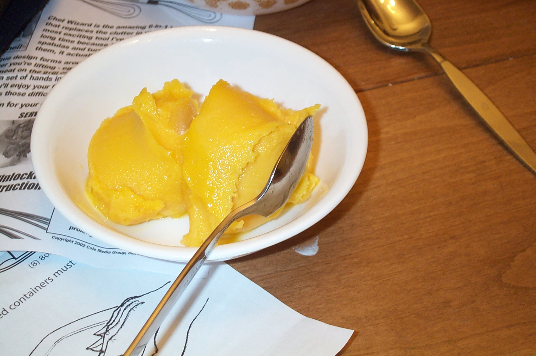 Mango sorbet